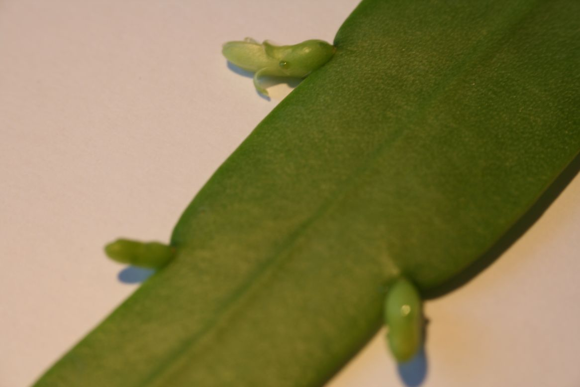 Pseudorhipsalis ramulosa (Hylocereeae; Cactaceae; Planta) kaktusz virágzó hajtása